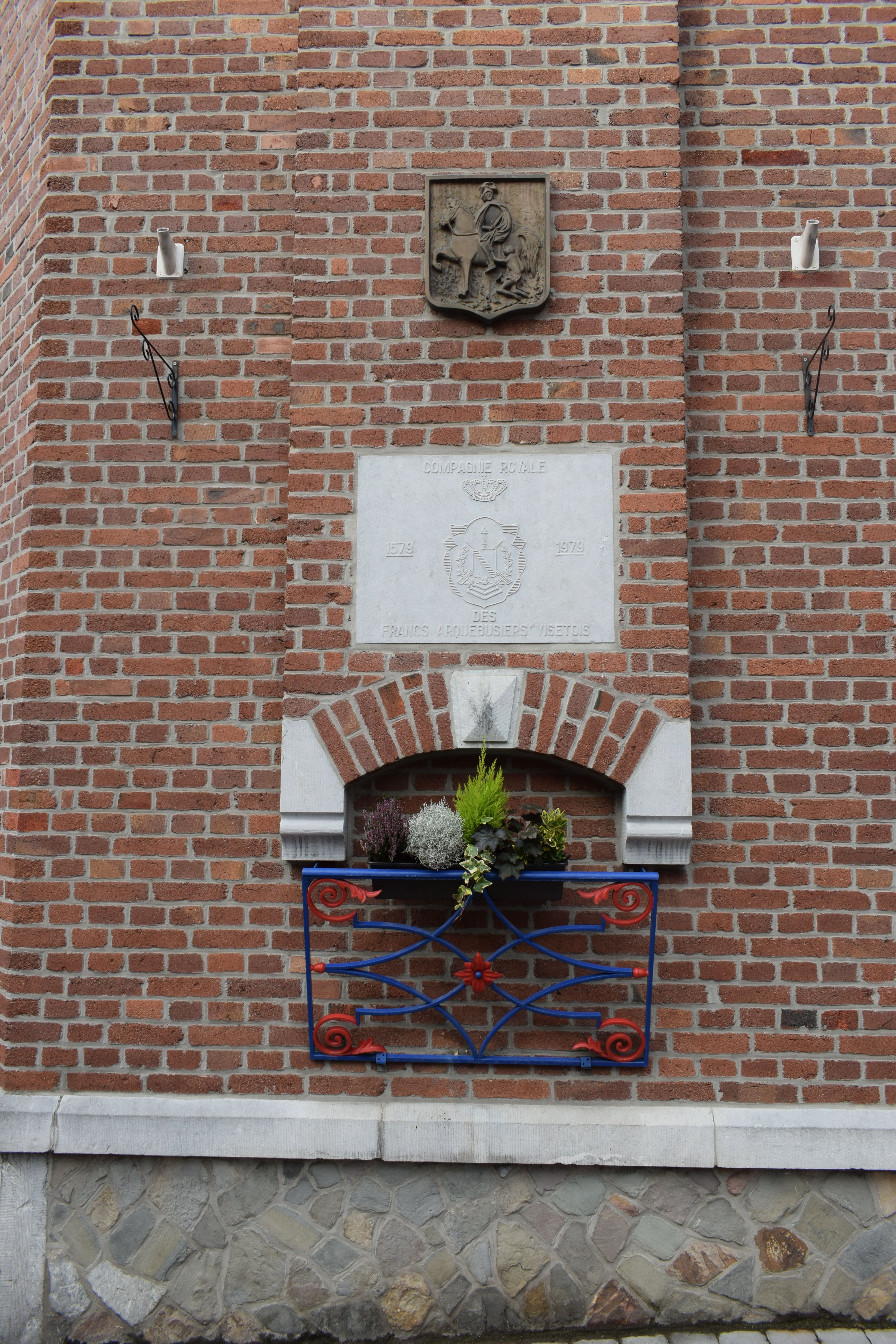 Vue de la rue Dodémont à Visé (Belgique).